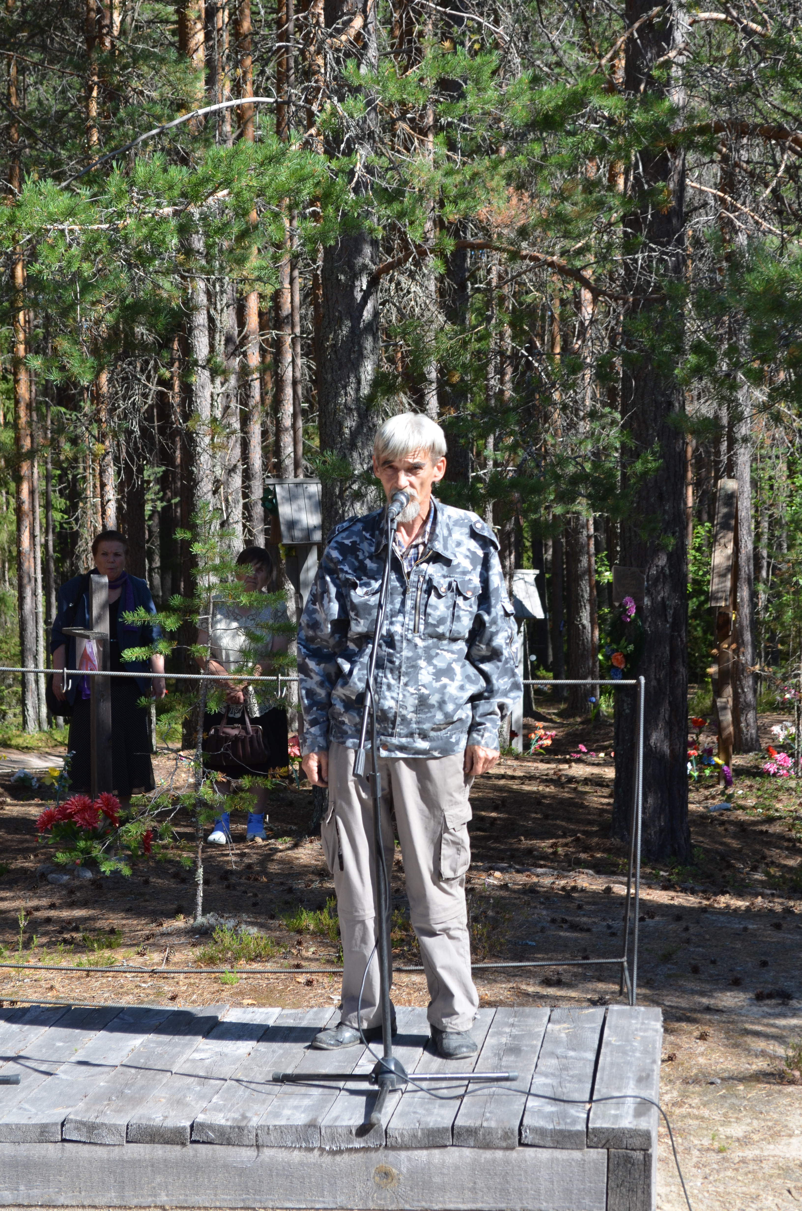 Урочище Сандармох. Дні пам’яті. Юрій Дмитрієв